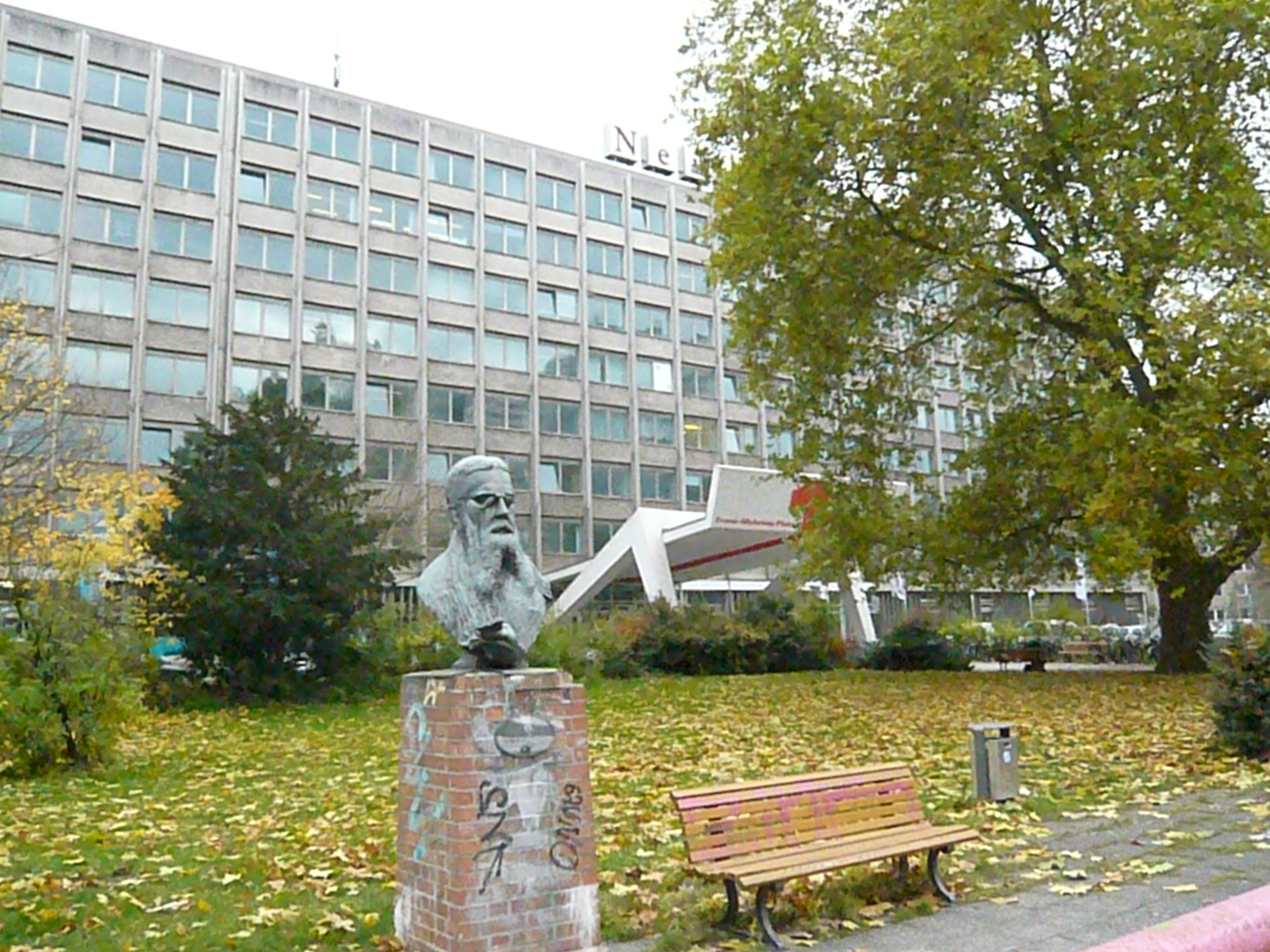 Fr.-Mehring-Platz im Ortsteil Berlin-Friedrichshain/